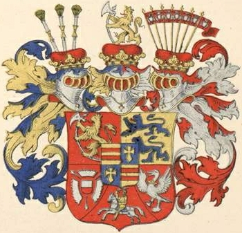 Holstein-Becki hertsogivapp